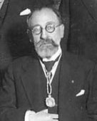 David Fernández Diéguez (1875-1936).